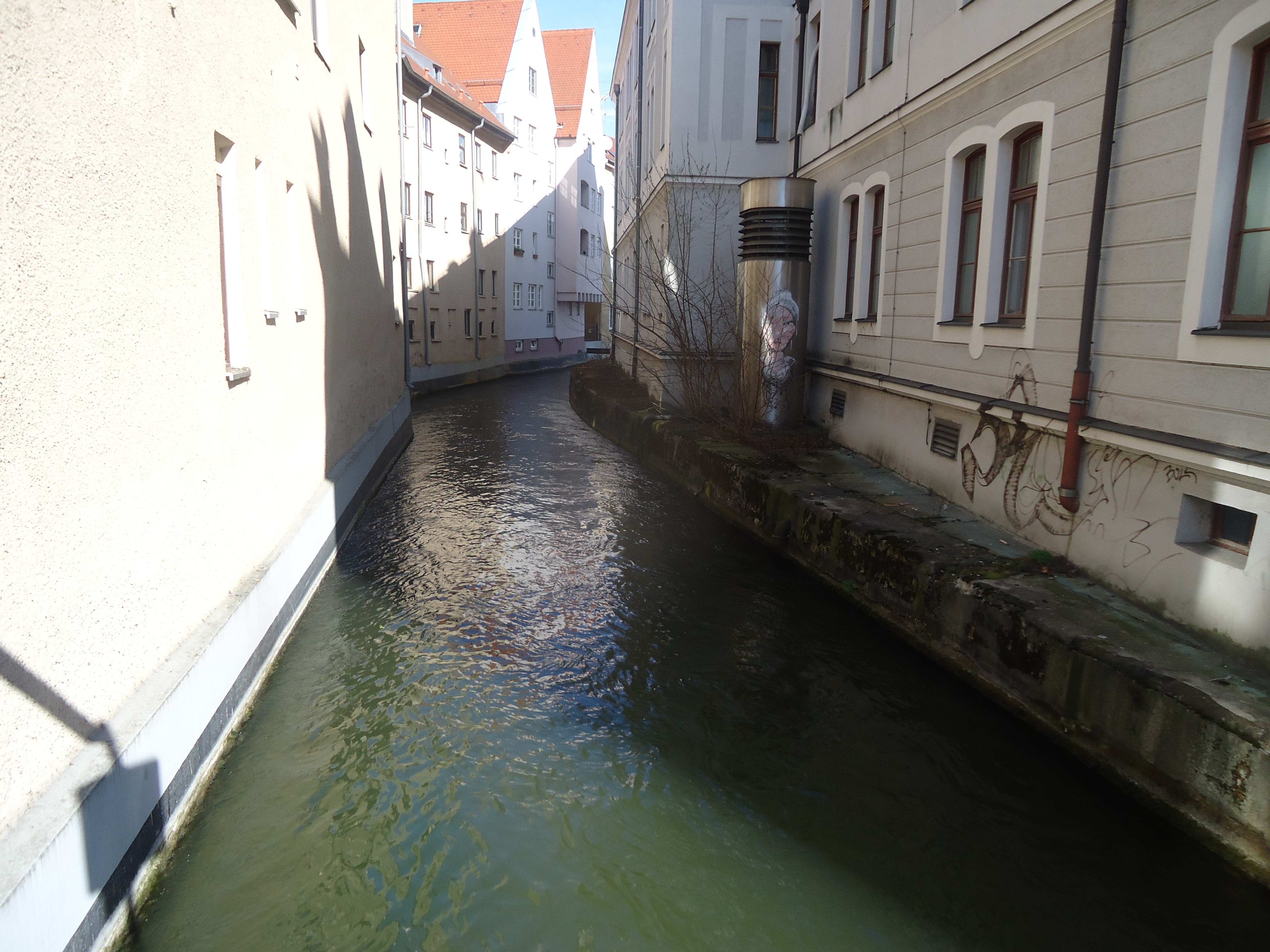 Blick auf den Stadtbach (Standpunkt beim Alten Stadtbad)